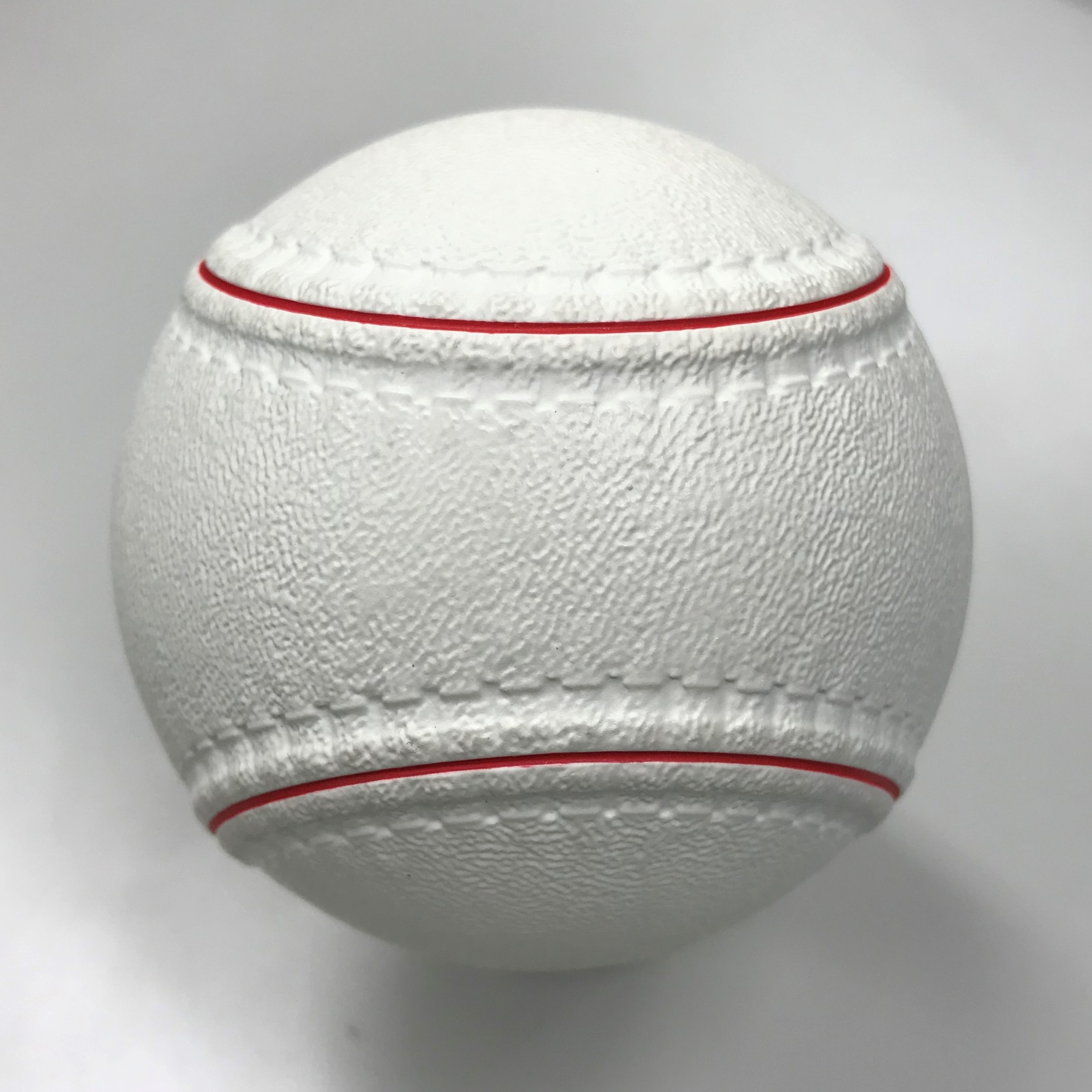 野球のボール。大きさ、重さは硬式球と同様。構造は軟式球と同様(ゴム製、中空)。